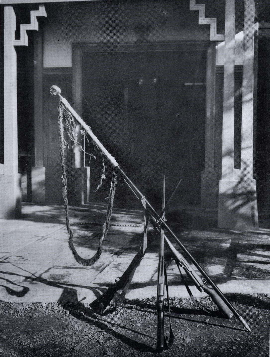 連隊旗。写真は騎兵第16連隊軍旗。